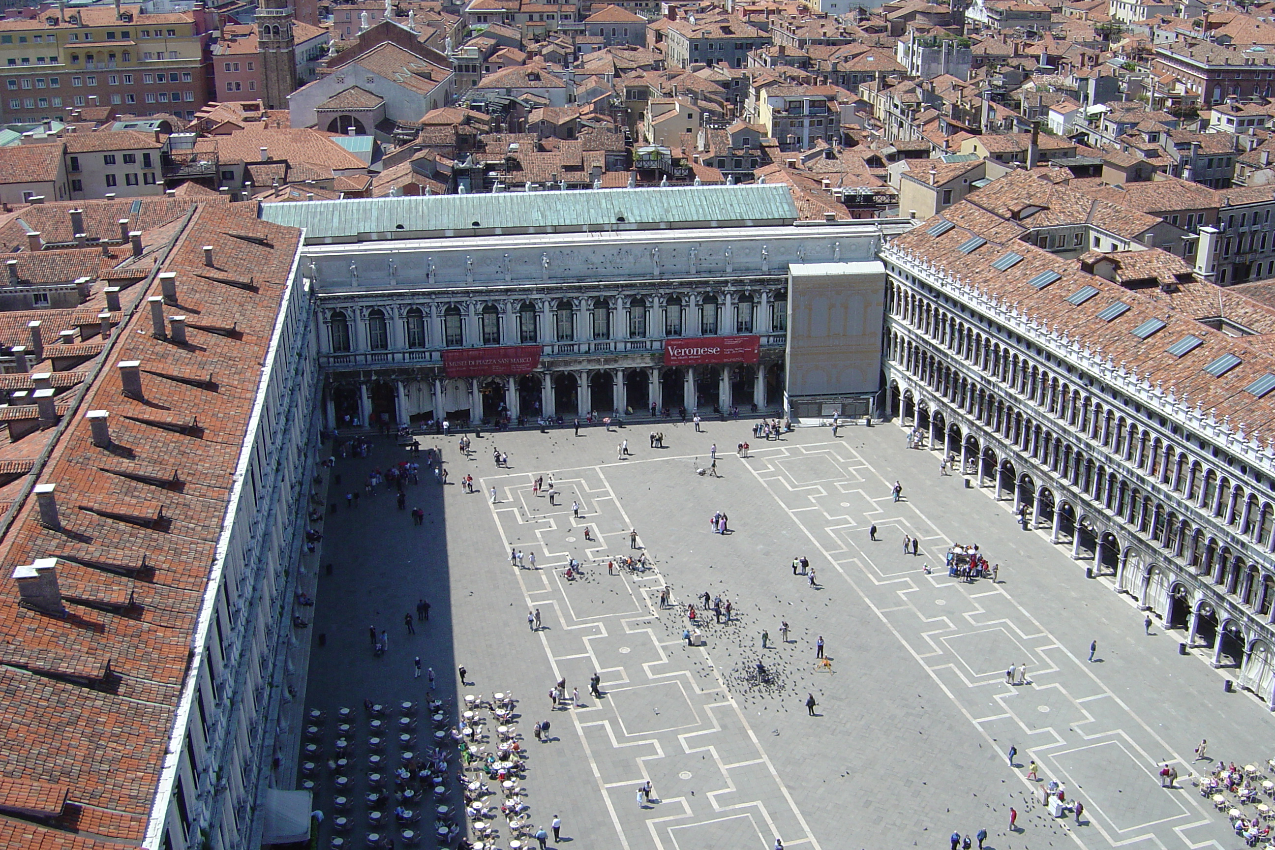 La Place Saint Marc vue du Campanile